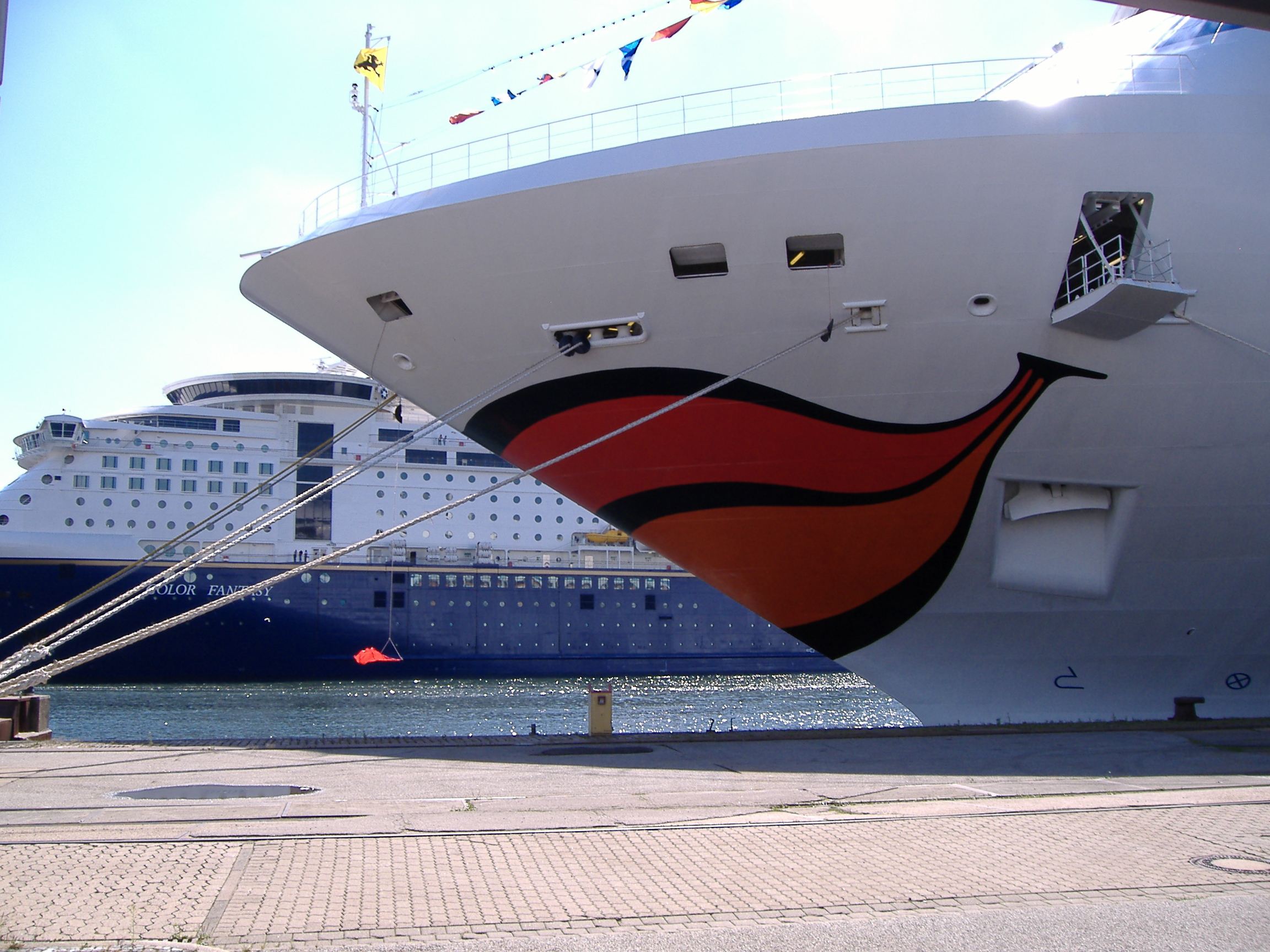 AIDA Cruises - Design "Kussmund"